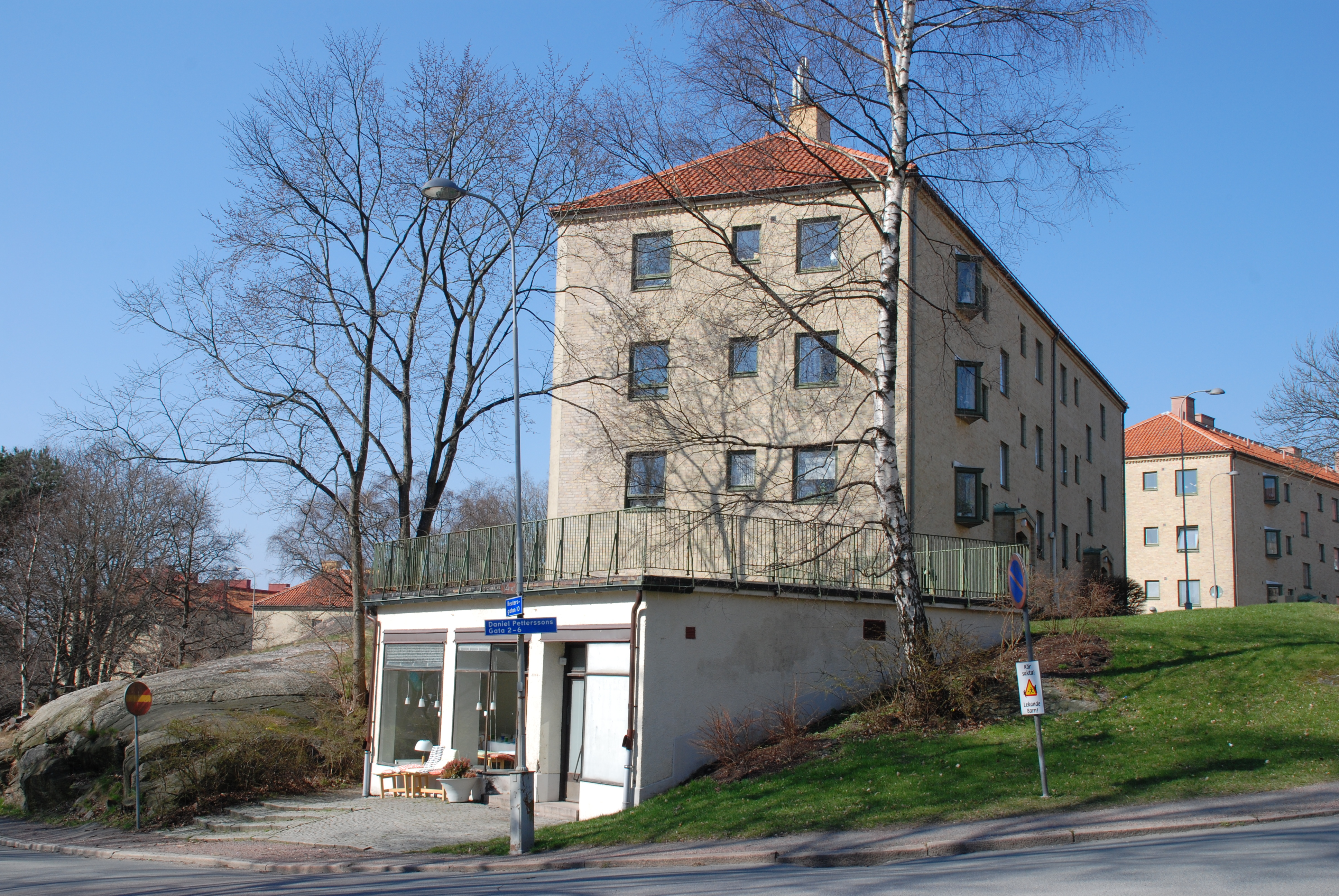 Daniel Petterssons Gata 2 i Norra Guldheden i Göteborg.